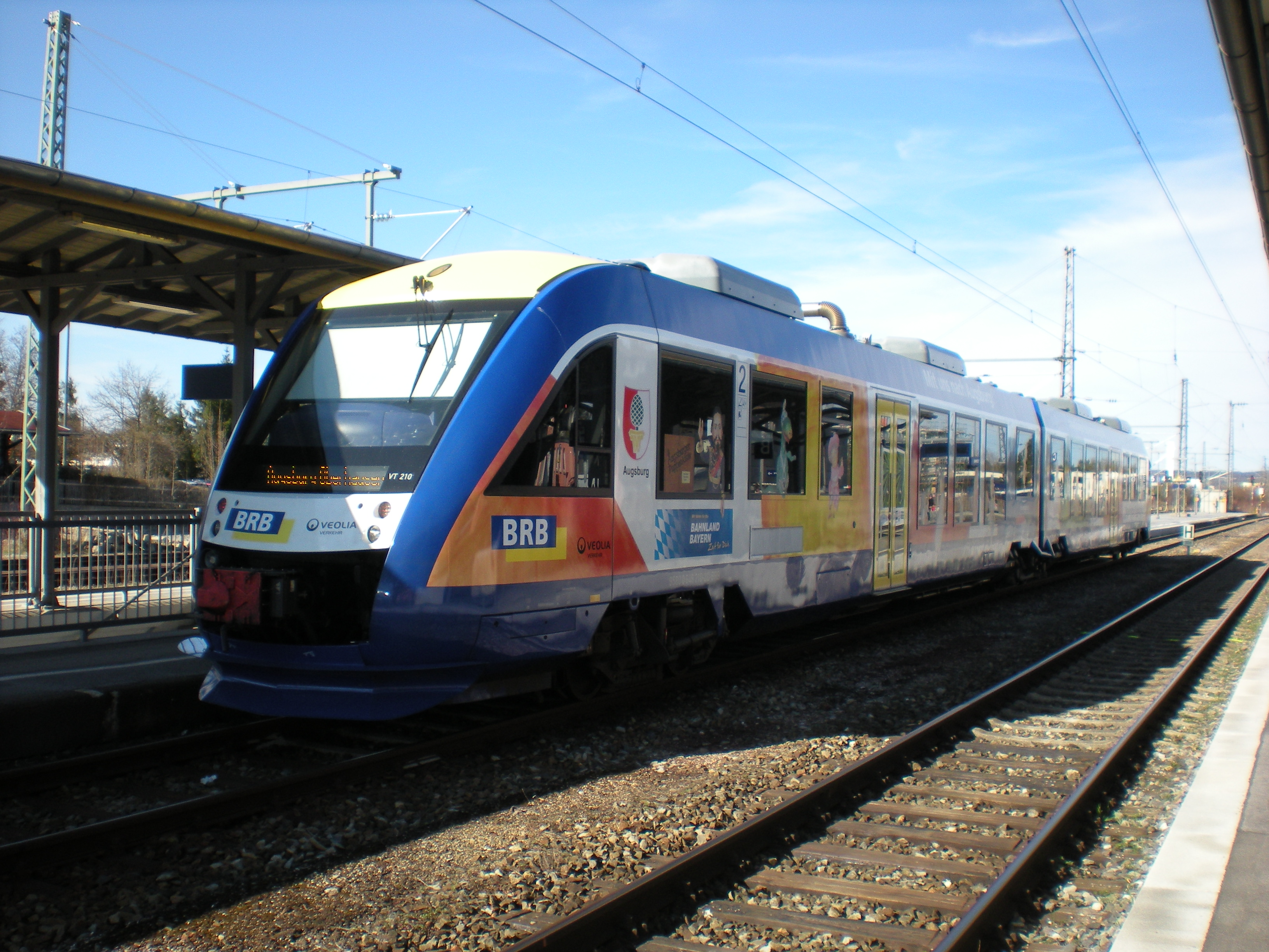 LINT 41-Triebwagen der BRB mit Werbebeklebung für die Augsburger Puppenkiste am Bahnhhof Weilheim